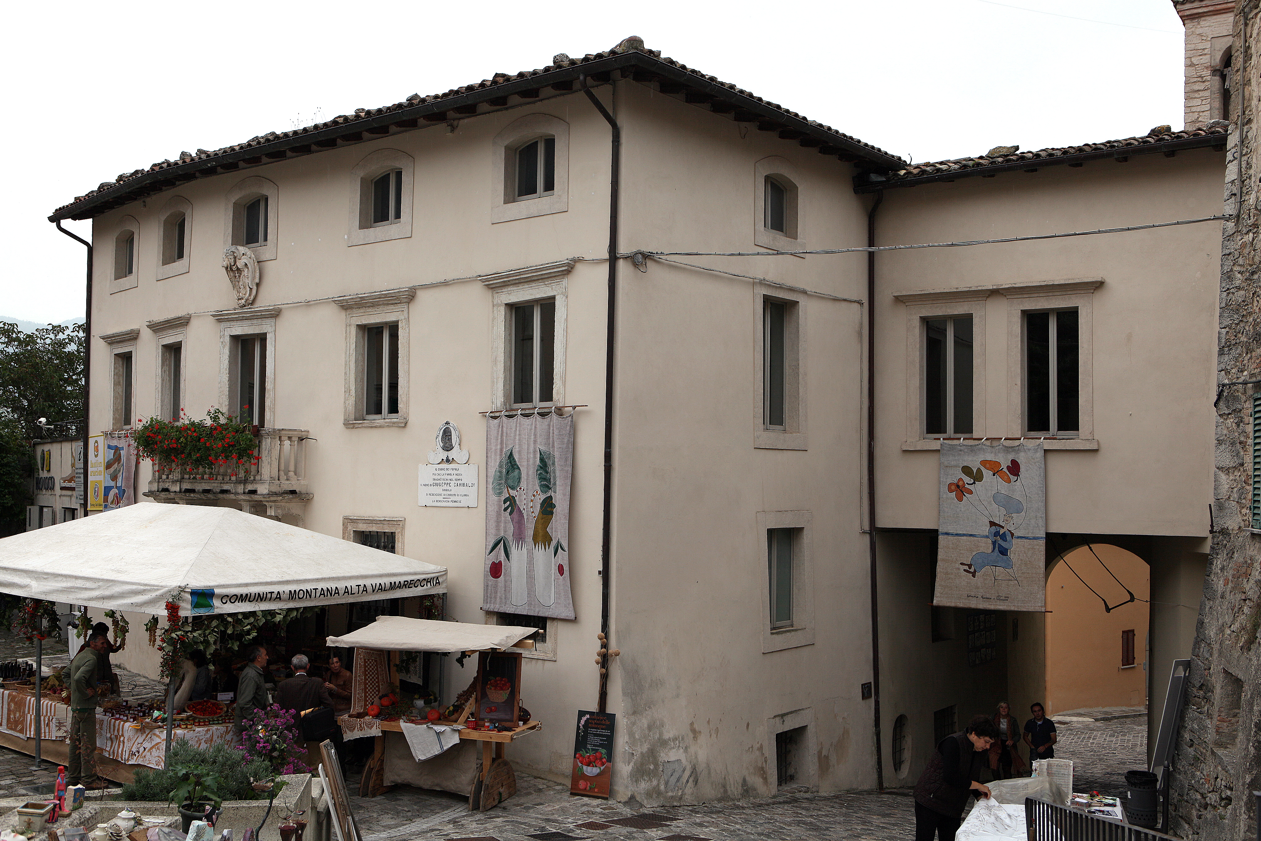 EX Palazzo Comunale ( ora Museo del calcolo Mateuereka) - MIBAC This is a photo of a monument which is part of cultural heritage of Italy.